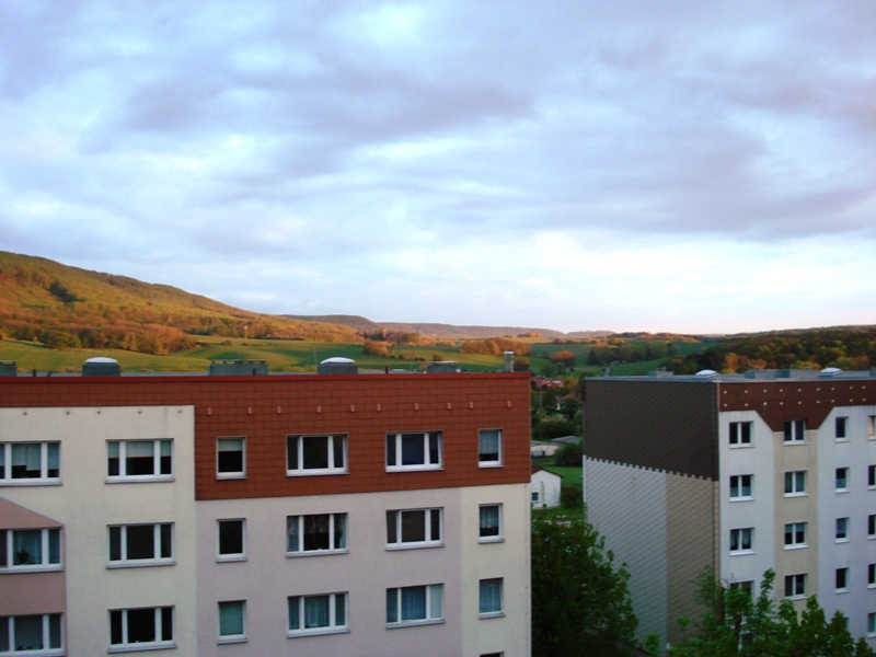 In Sollstedt wurde Mitte des 20. Jahrhunderts damit begonnen, Wohnraum für die vielen Arbeiter des Kaliwerks zu schaffen. Da die Altneubauten jedoch schnell nicht mehr ausreichten wurde 1968 mit der Grundsteinlegung von zunächst drei Wohnblocks zu je 80 Wohnungen in Plattenbauweise begonnen. Bis 1989 stieg die Zahl der neuen Wohnblocks auf neun und die Zahl der neu geschaffenen Wohnungen auf 480. (im Hintergrund der östliche Dünkamm mit dem Kriegsberg li)